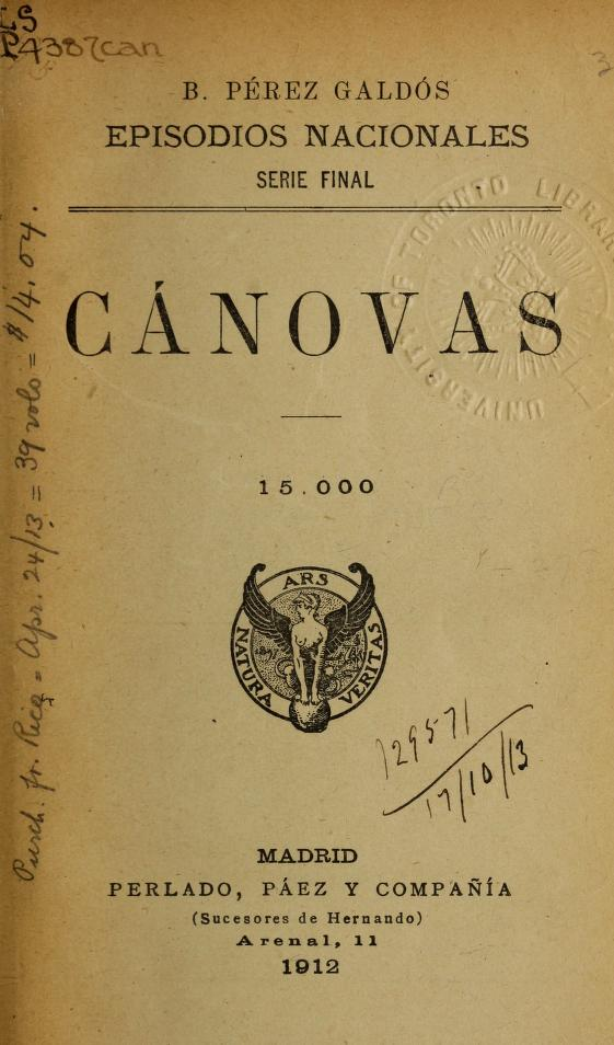 Portada de Cánovas, novela de 1897 de Benito Pérez Galdós perteneciente a los Episodios nacionales.